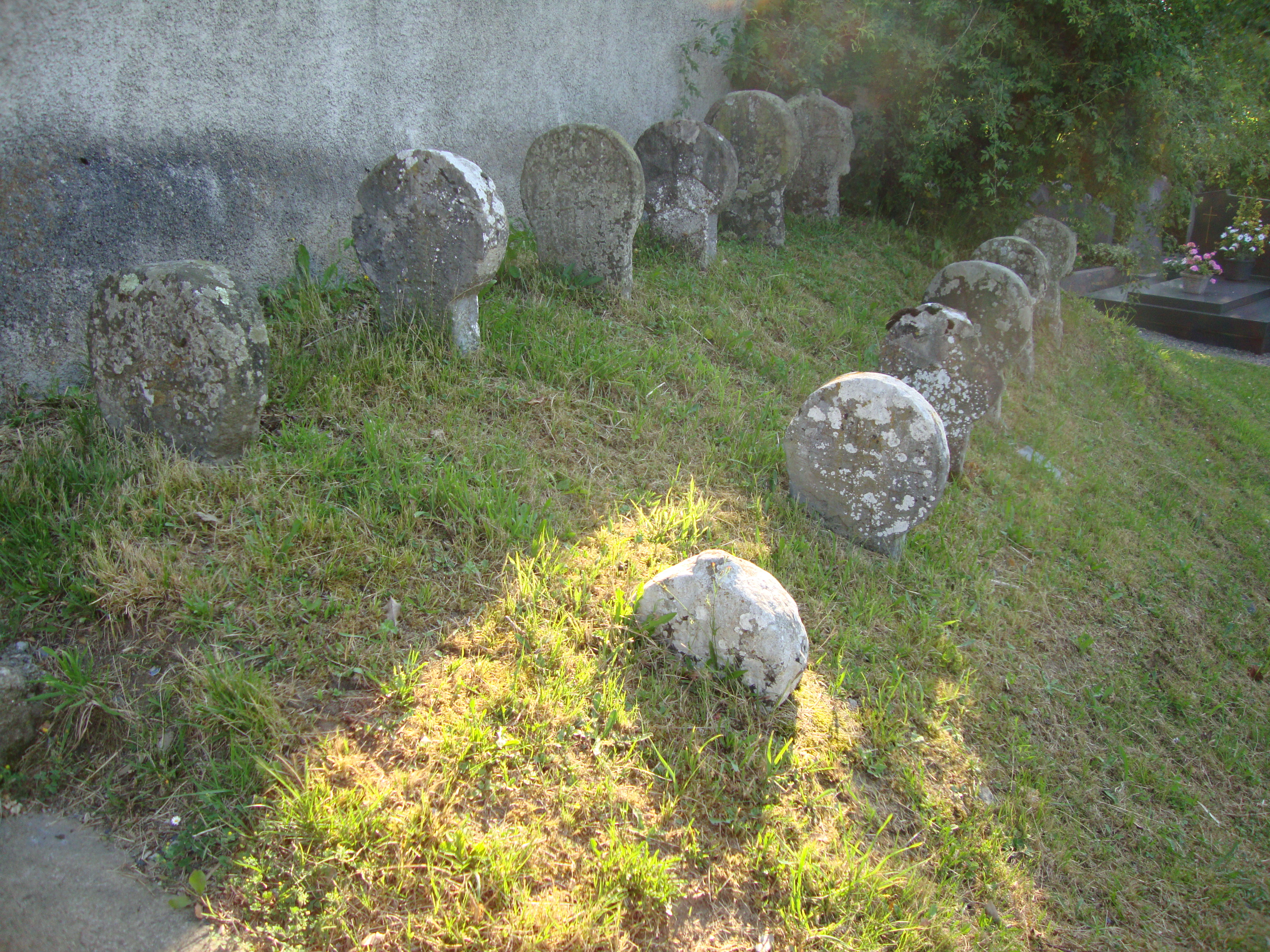 Alos (Alos-Sibas-Abense, Pyr-Atl, Fr) old discoïdal steles